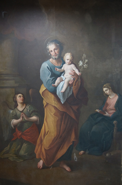 Ян Дамель. Святы Іосіф з Дзіцяткам Ісусам